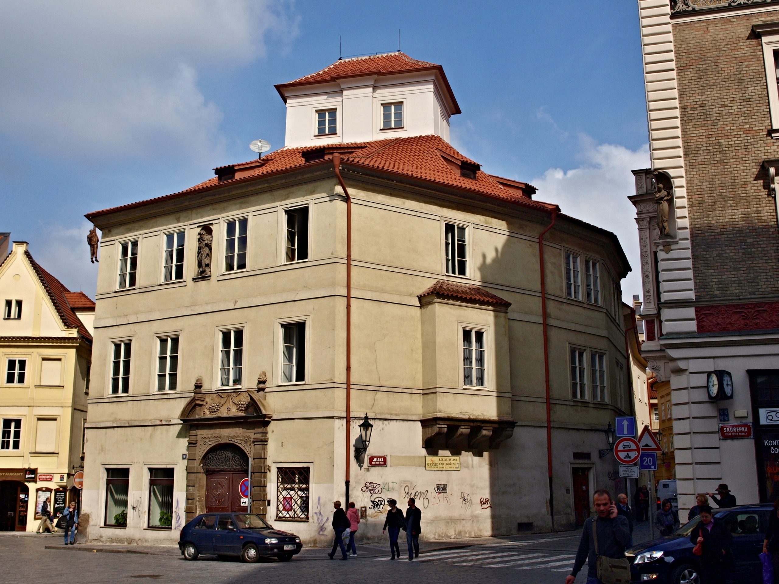 Dům U Sladkých